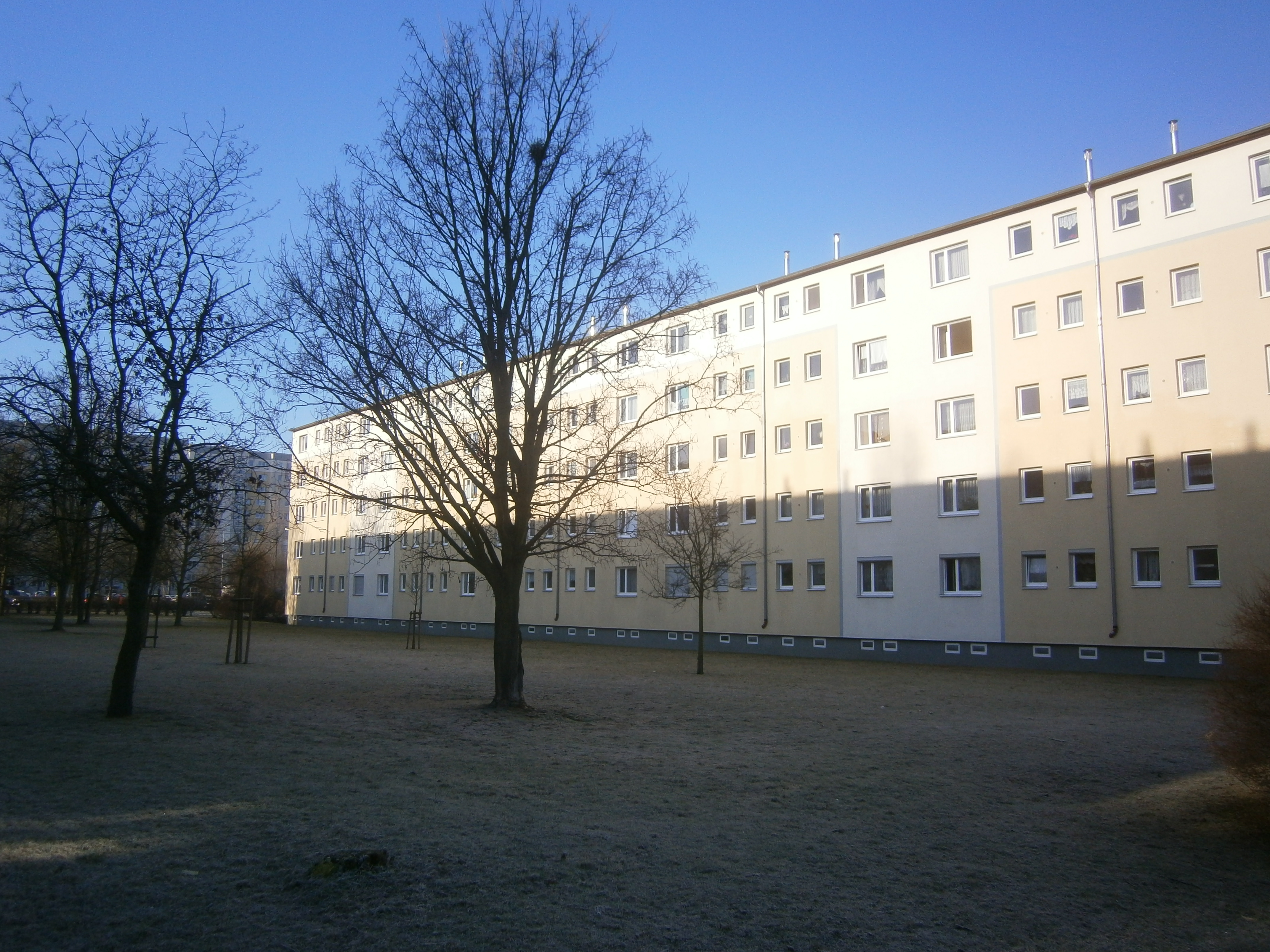 Die Michelangelostraße ist eine Hauptverkehrsstraße am Nordrand des Ortsteils Berlin-Prenzlauer Berg